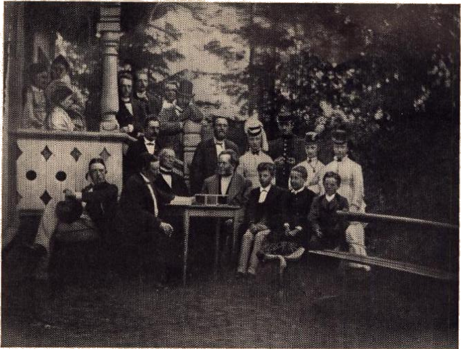 Fra Sarabråten. På trappen: Fru Heftye, fru Faye, Suzannah Ibsen, A. Blytt, [ukjent], Faye, Thomas Heftye. Stående: Sophus Aars, Jacob Heiberg, [4 ukjente]. Sittende: F. Rustad, kammerherre Gran, Christian Friele, Henrik Ibsen, Sigurd Ibsen, [ukjent], Jacob Heftye.